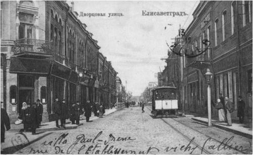 Дворцова вулиця Кіровограда, поч. ХХ ст.